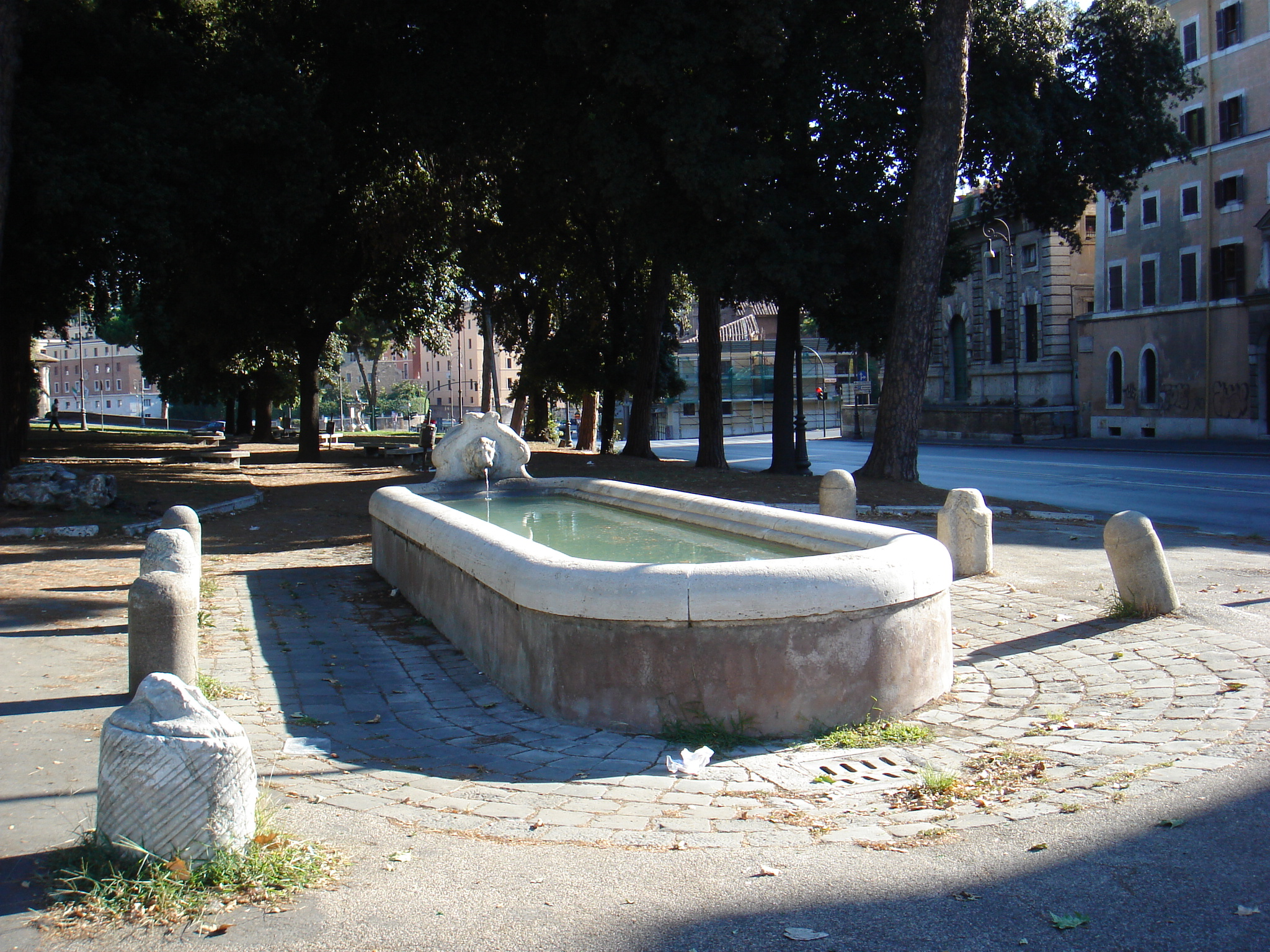 Roma, via di Santa Maria in Cosmedin (Bocca della Verità): abbeveratoio di Clemente XI (1717)